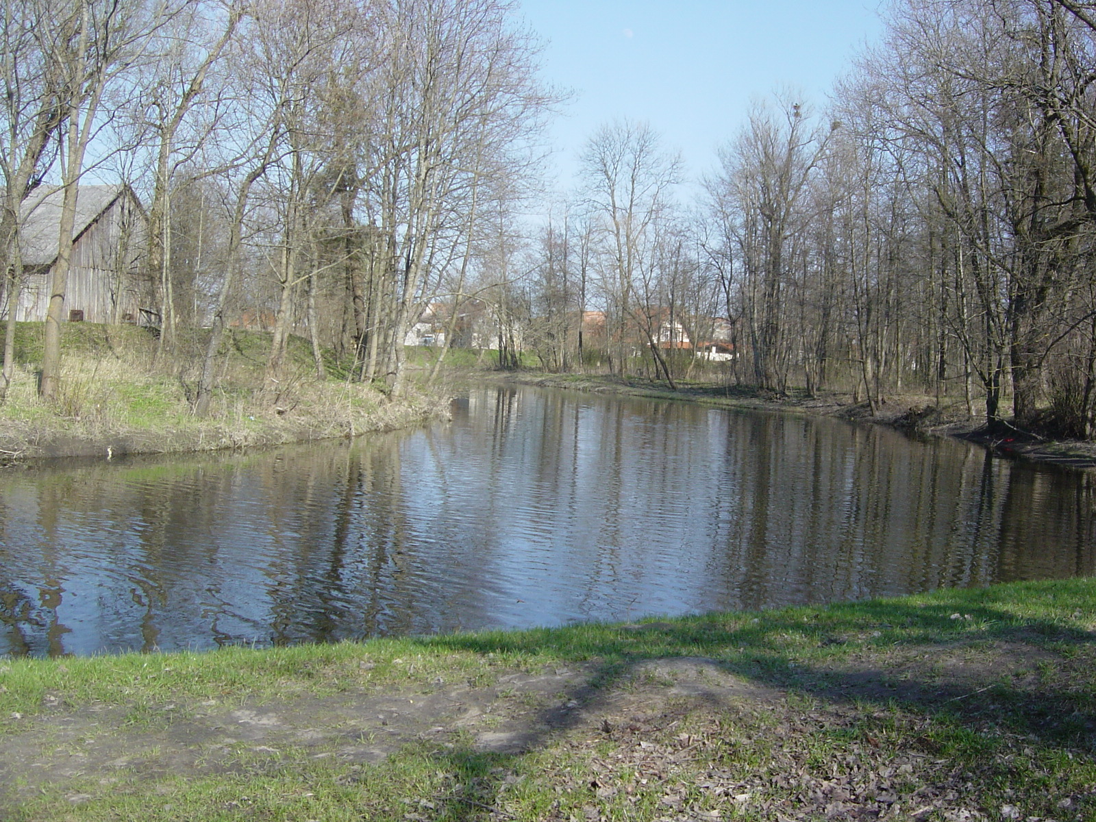 Šyša